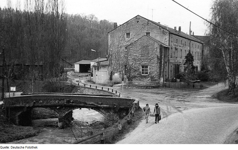 Original image description from the Deutsche FotothekTriebischtal-Robschütz. Talkumwerk, ehem. Papierfabrik, Außenansicht